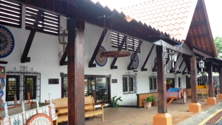 Sarchí es la cuna de la artesanía de Costa Rica y sus muebles tienen reconocimiento internacional, cuenta con muchas y grandes fabricas y tiendas, que son visita obligada para los turistas